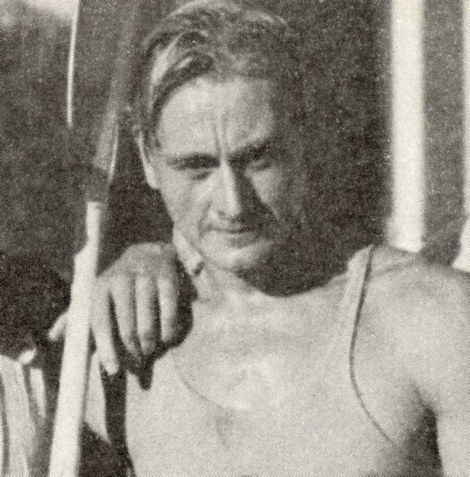 Ingemar Hedberg